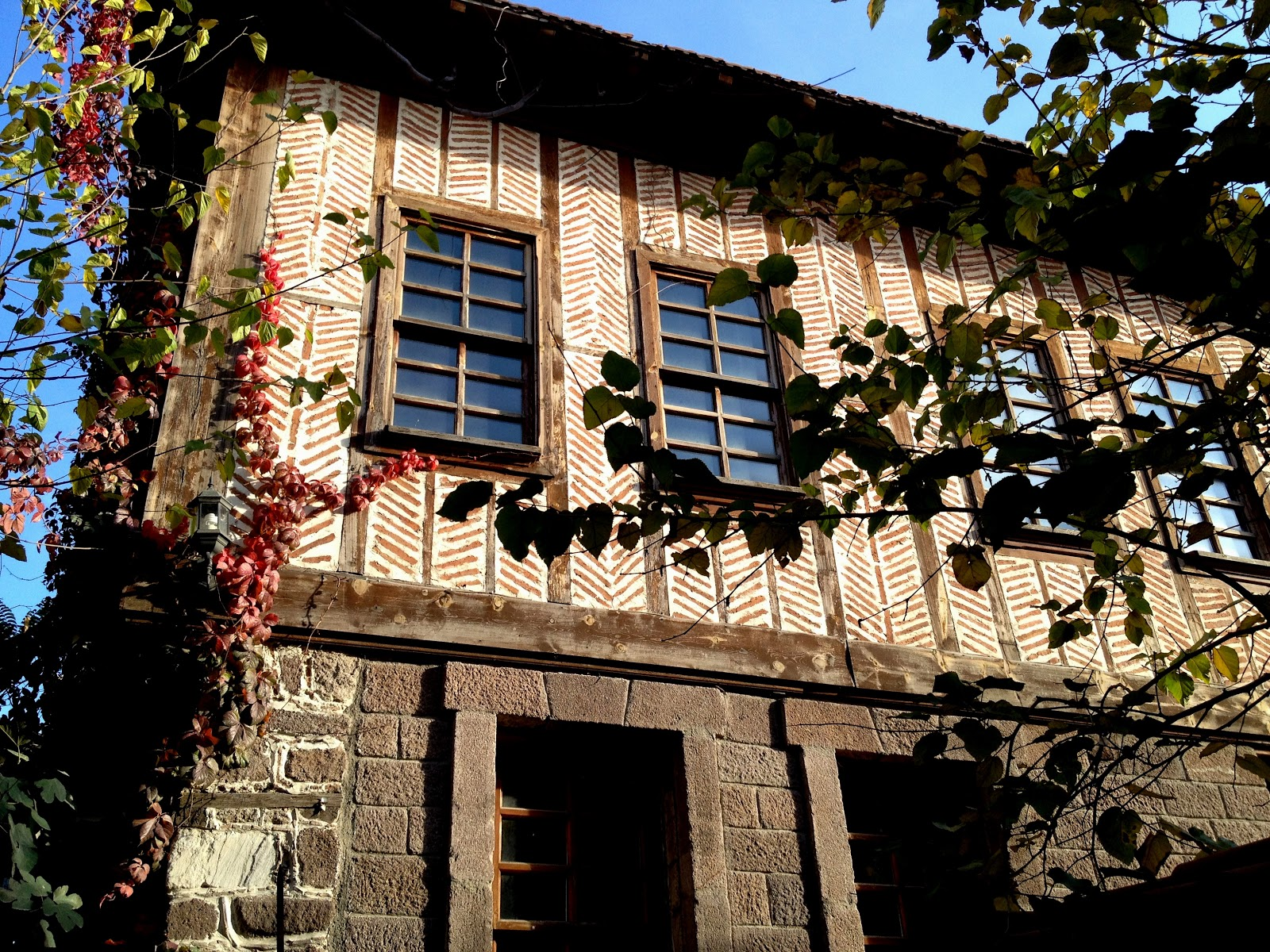 Travel and observation notes about 1 month. Ankara houses, streets, mosques, cafes and historical places.